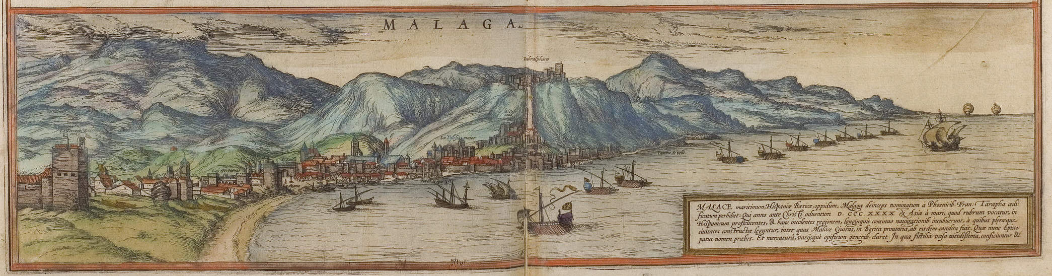 Málaga